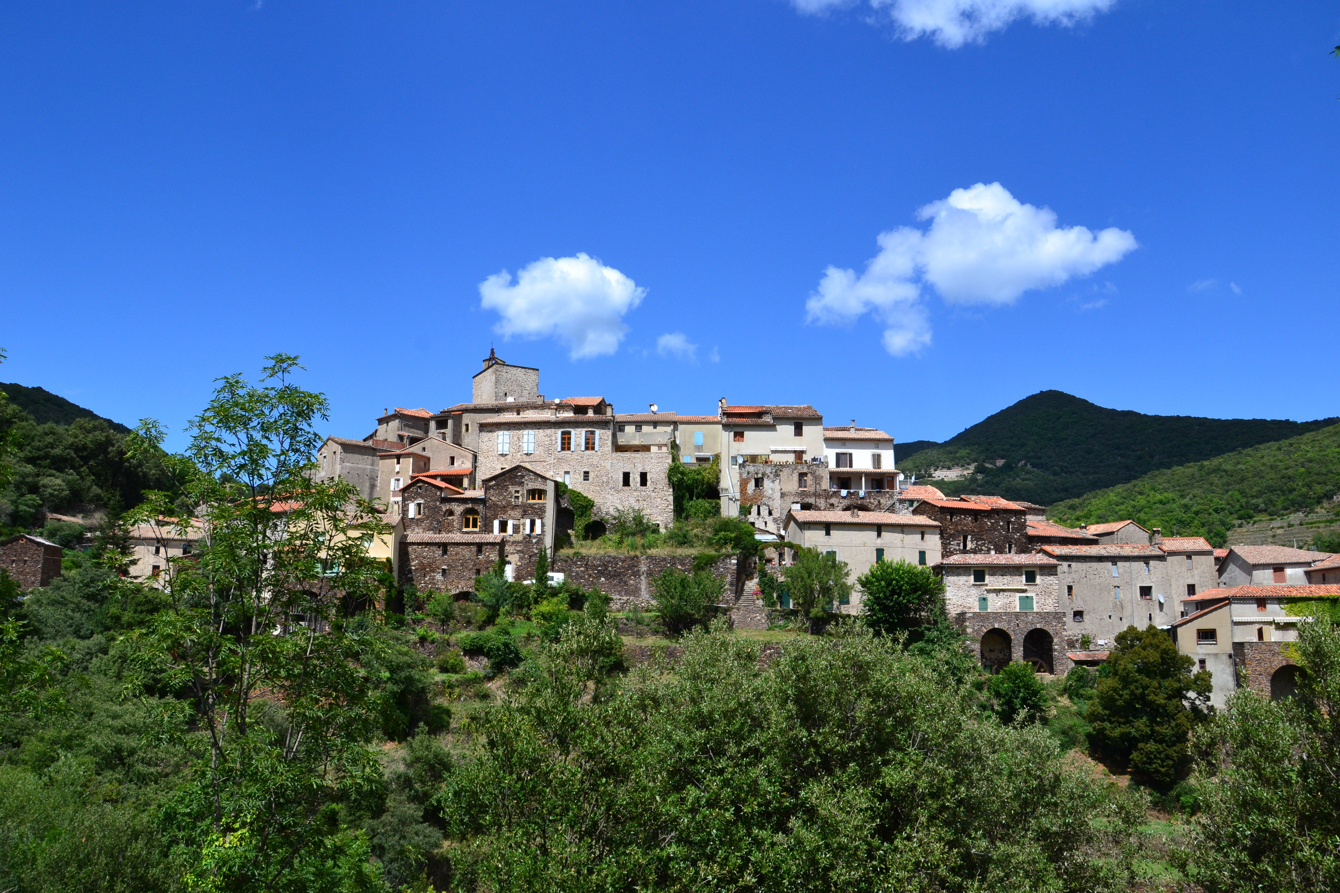 Village de St Martial (Gard)